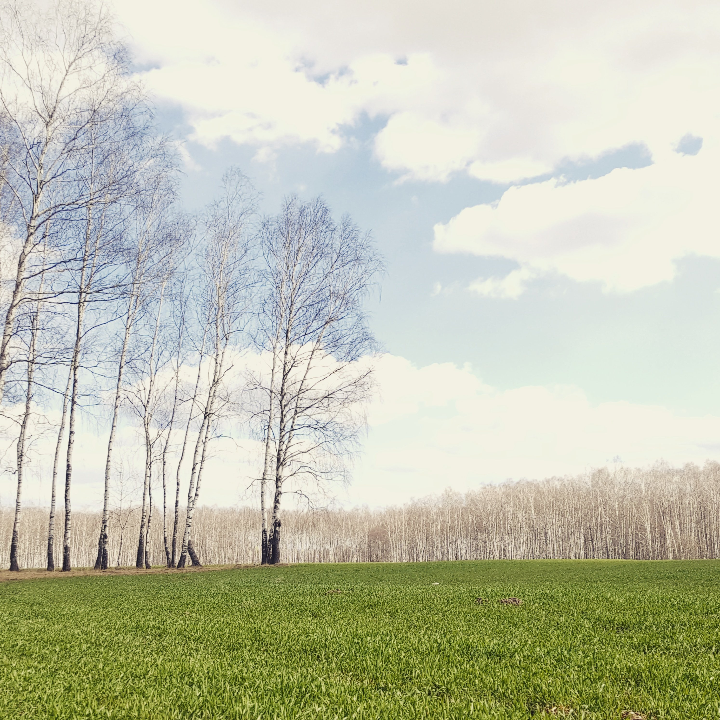 Брянское полесье